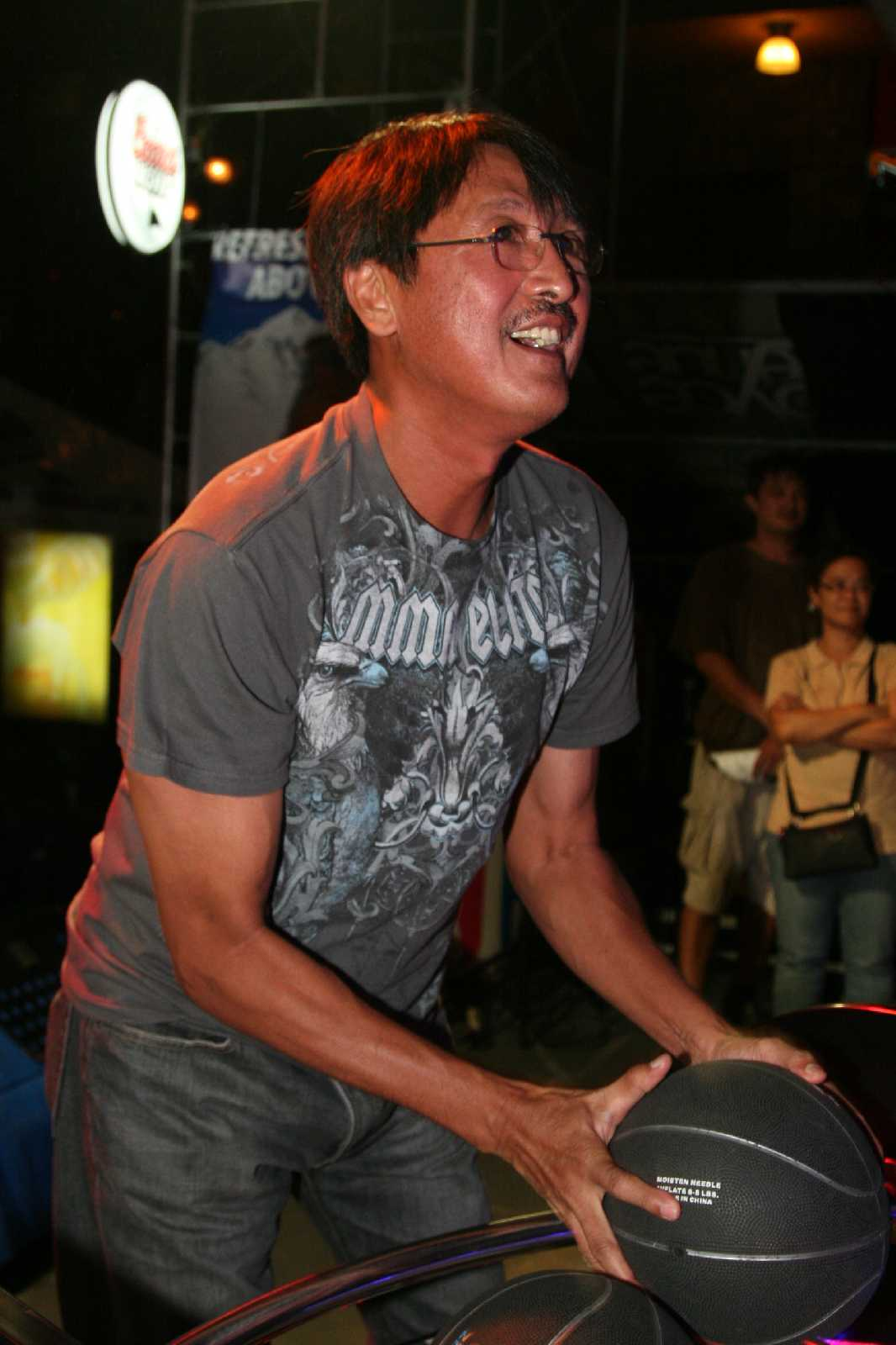 Filipino basketball player Atoy Co playing pop-a-shot